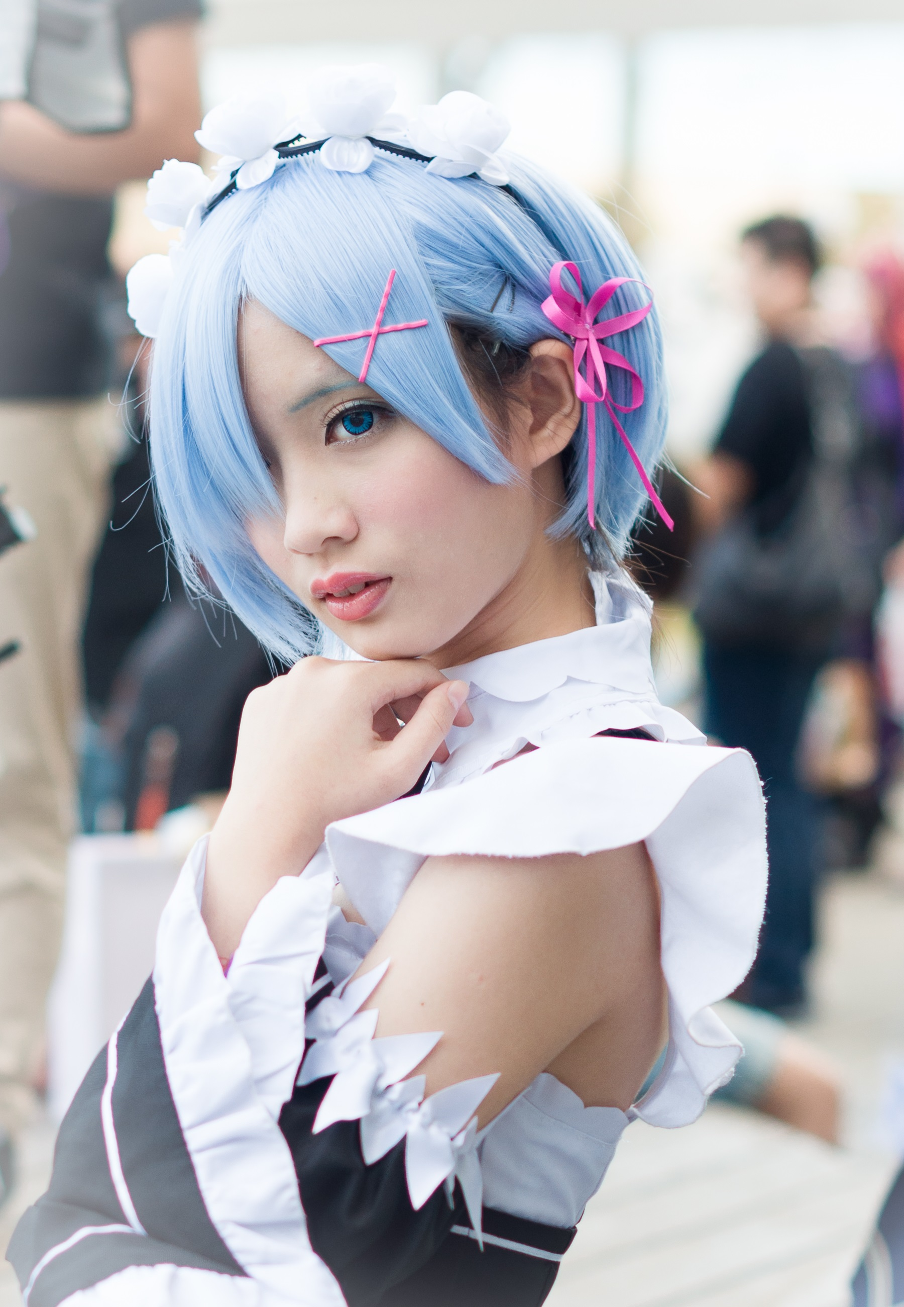 第25屆亞洲動漫創作展，《Re:從零開始的異世界生活》雷姆cosplayer。